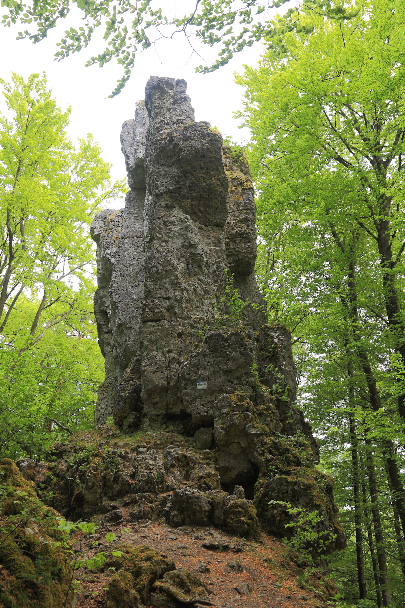 Geotop-Nummer: 574R009, Nürnberger Land 6434 Hersbruck R: 4461196 H: 5492591 Sehr poröser Dolomit